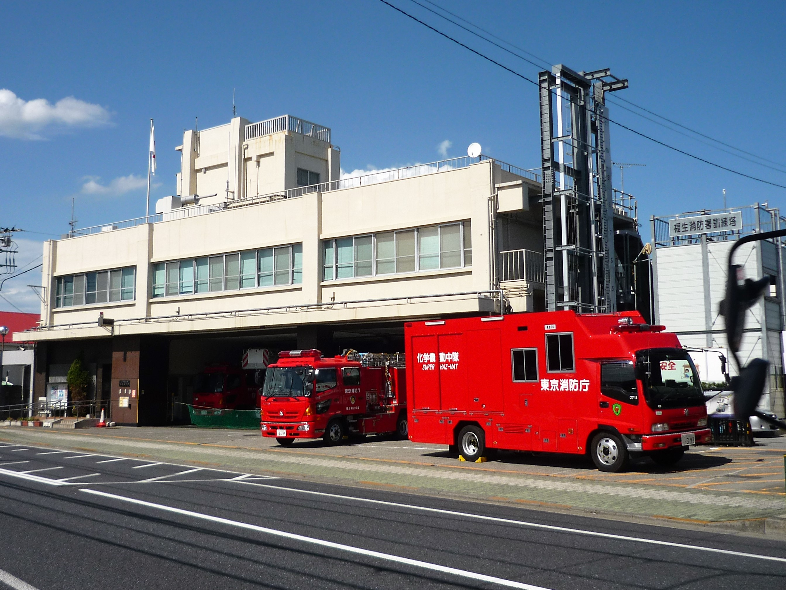 福生消防署（本署）